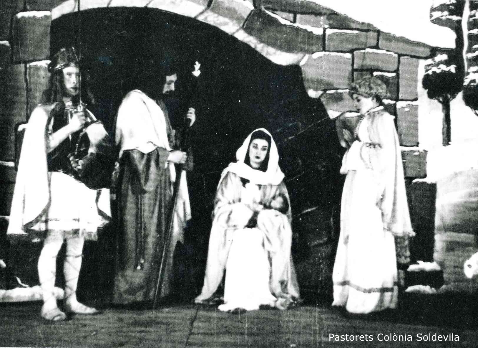 Any 1948. Autor desconegut. Una de les primeres representacions dels Pastorets a la Colònia Soldevila de Balsareny